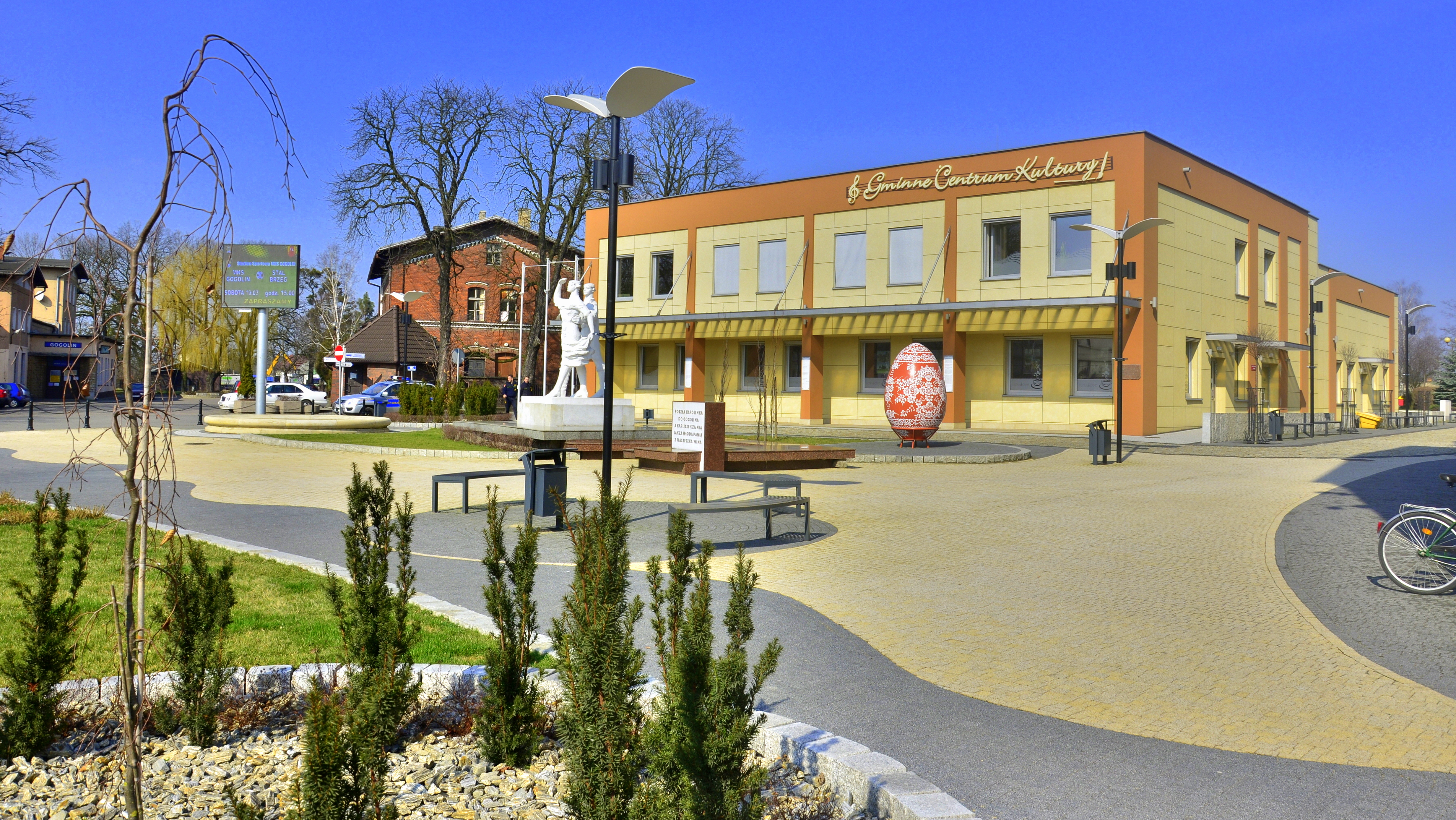 Gminne Centrum Kultury w Gogolinie i przyległy do niego skwer